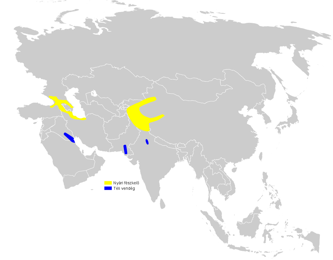 Phylloscopus sindianus distribution map, based on